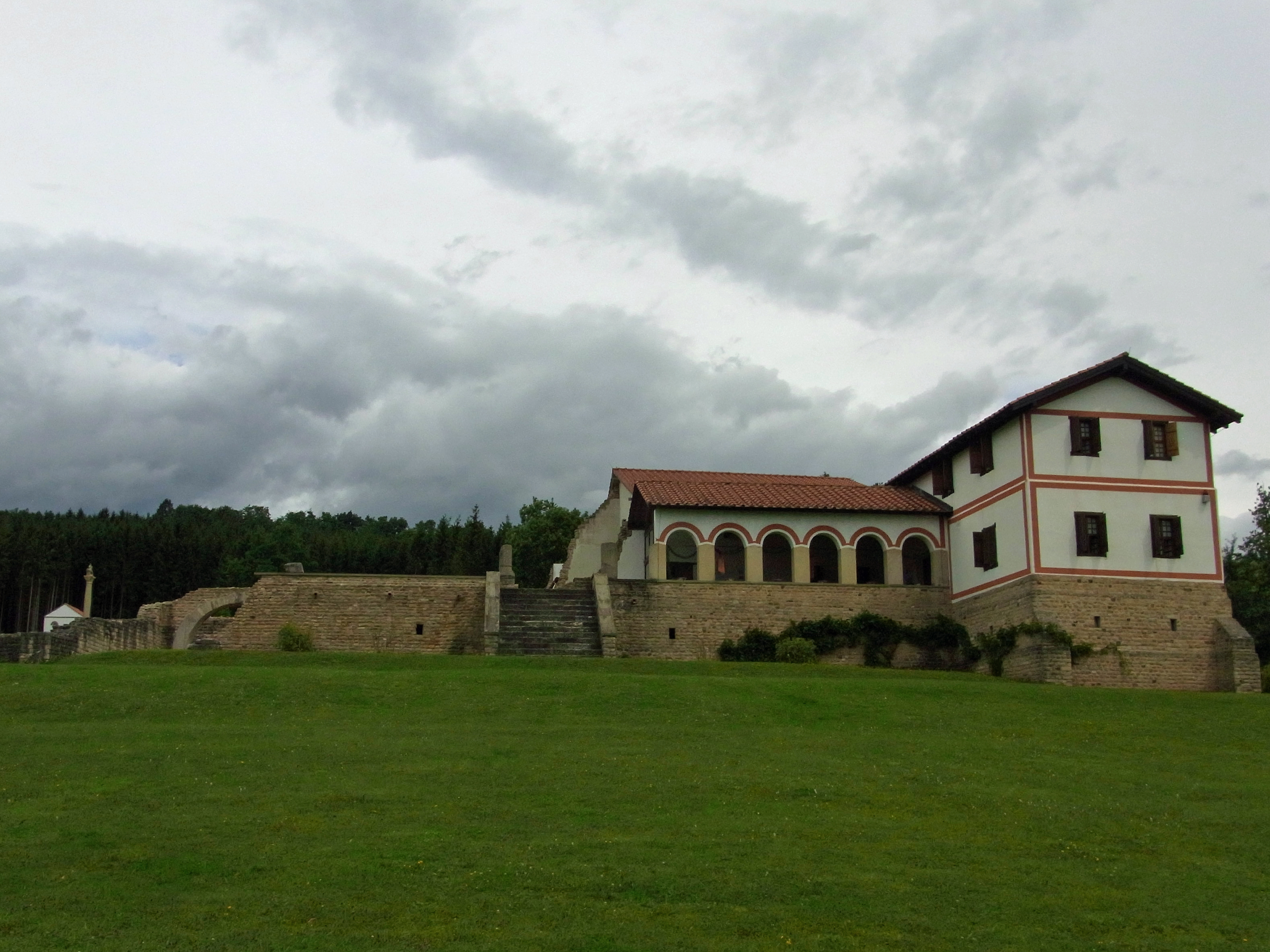 Hechingen: Römisches Freilichtmuseum Hechingen-Stein